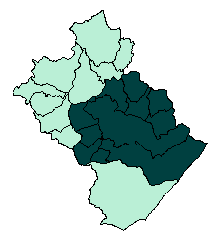 Verbandsgemeinde Thalfang, Mark Thalfang; Erläuterung der Karte: Rechts oben Horath, darunter Gräfendhron und Merschbach, oben mittig Berglicht, links daneben Heidenburg, Büdlich und Breit, darunter Schönberg und Neunkirchen; ganz unten Malborn; Markorte: mittig Thalfang/Bäsch, darunter Hilscheid und weiter im Uhrzeigersinn: Dhronecken, Burtscheid, Lückenburg, Talling, Gielert, Etgert, Immert, Rorodt, Deuselbach.